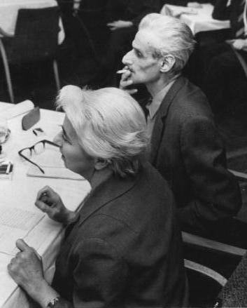 Zentralbild Spremberg 29.3.67 Berlin: Das Schriftstellerehepaar Jeanne und Kurt Stern (Vordergrund) berichtete am 28.3.67 im Klub der Kulturschaffenden "Johannes R. Becher" über seine Reiseeindrücke von der Demokratischen Republik Vietnam und über den heldenhaften Kampf des vietnamesischen Volkes.